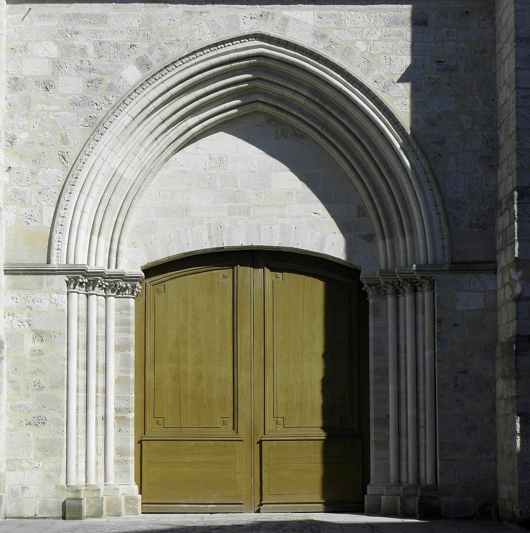 Extérieur de l'église Saint-Étienne de Brie-Comte-Robert (77). Façade occidentale. Portail.